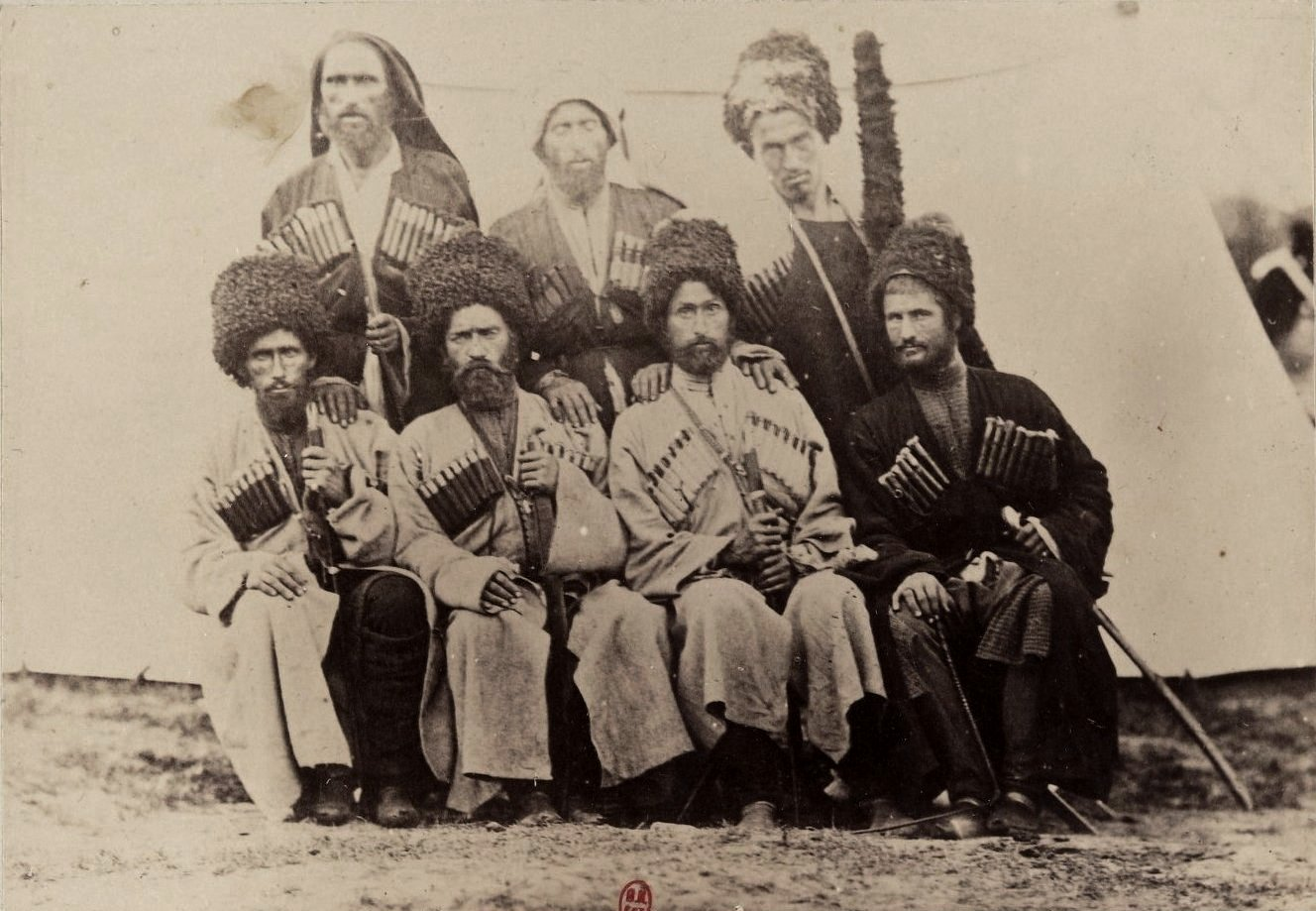 Barry (capitaine). F. 21. Ossèthes (Ossètes). Mission scientifique de Mr Ernest Chantre. 1881